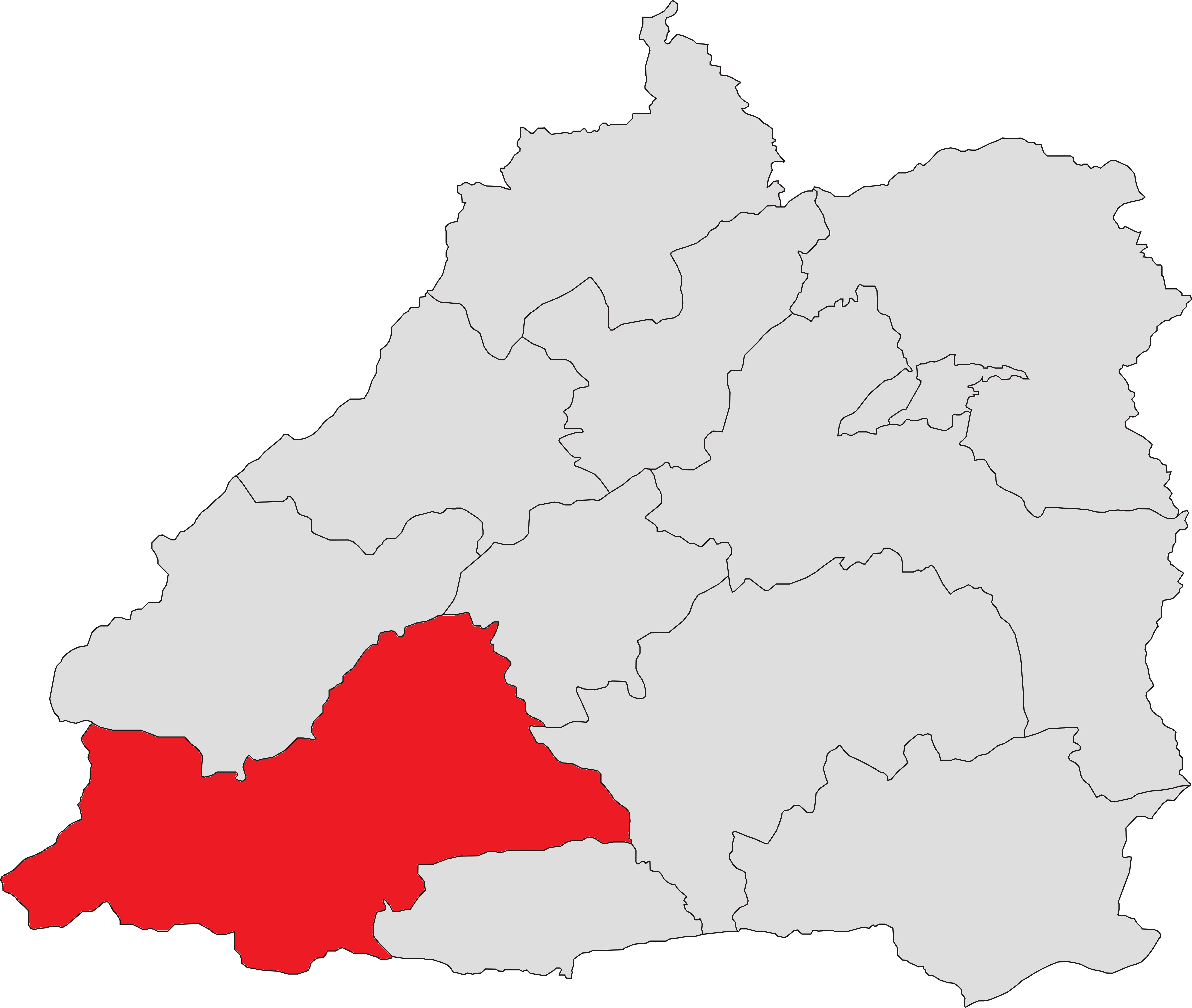 中文（中国大陆）: 芒市遮放镇位置图